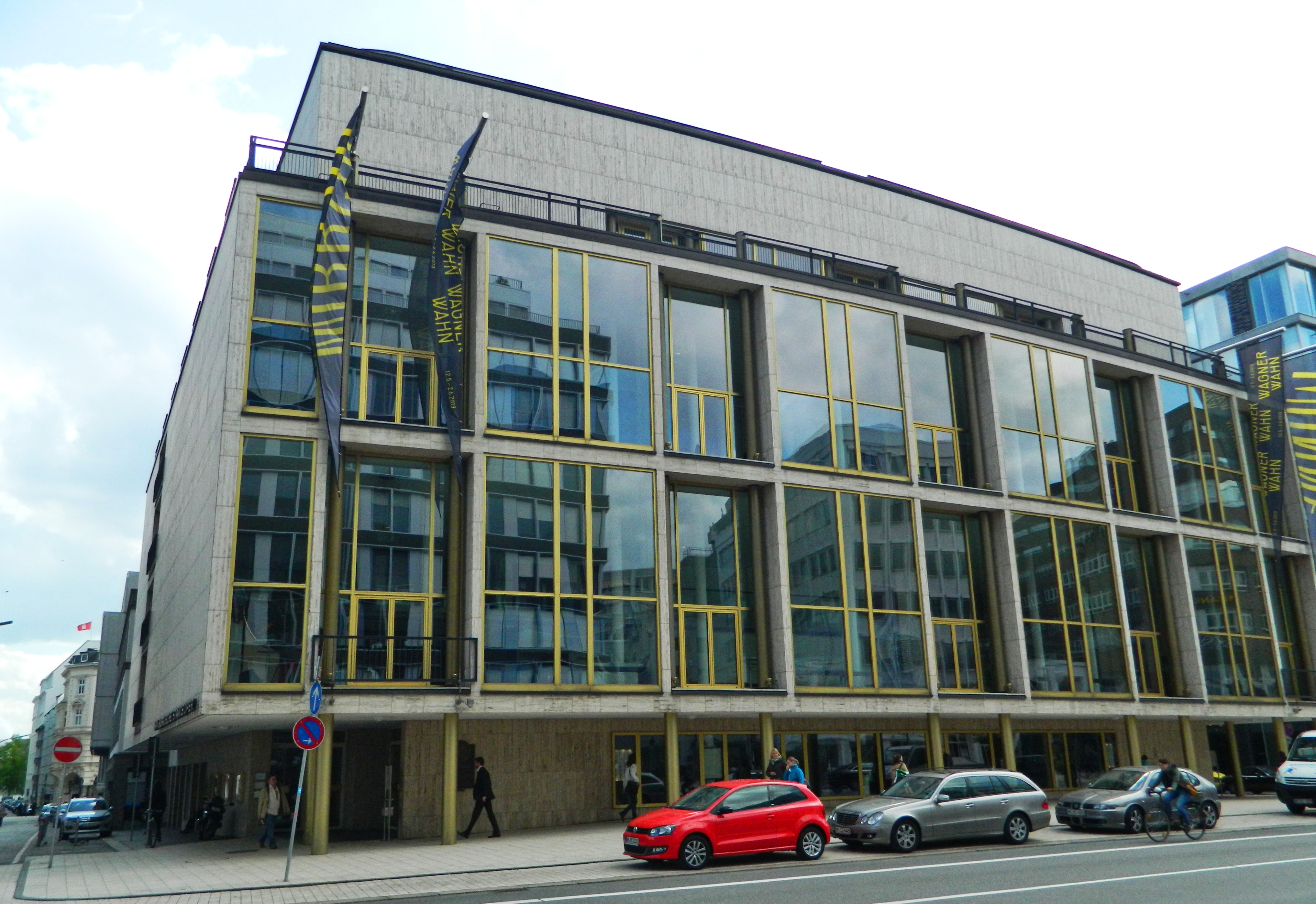 Hamburgische Staatsoper